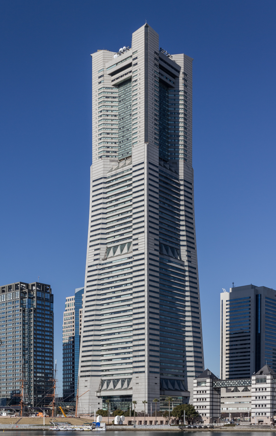 Yokohama Landmark Tower（神奈川県横浜市）